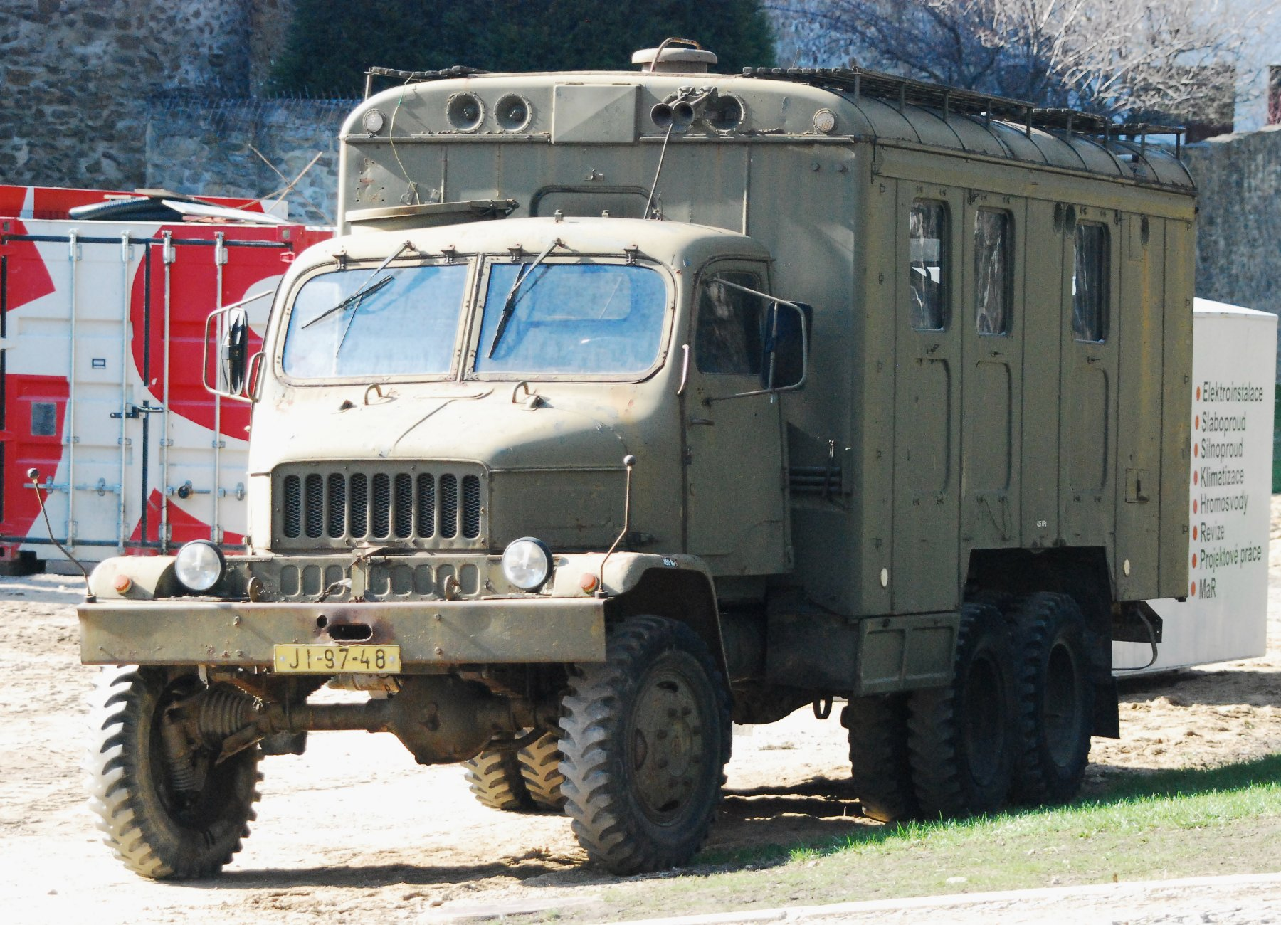 Ausgedienter Militär-LKW auf einer Baustelle in Znojmo in der Tschechischen Republik